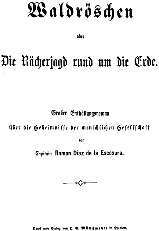 Titelblatt der Erstausgabe des Fortsetzungsromans Waldröschen (1882-1884) von Karl May